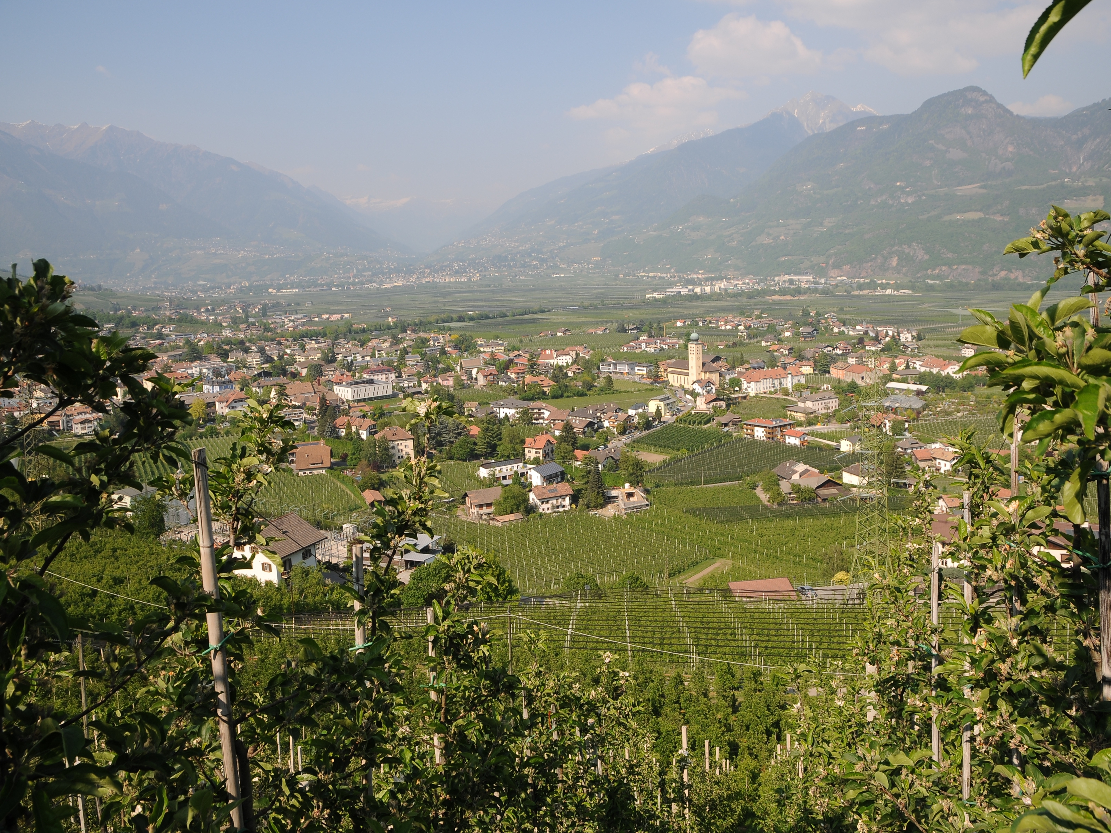 Der Brandiswaalweg eröffnet immer wieder neue Blicke auf die Gemeinde Lana.